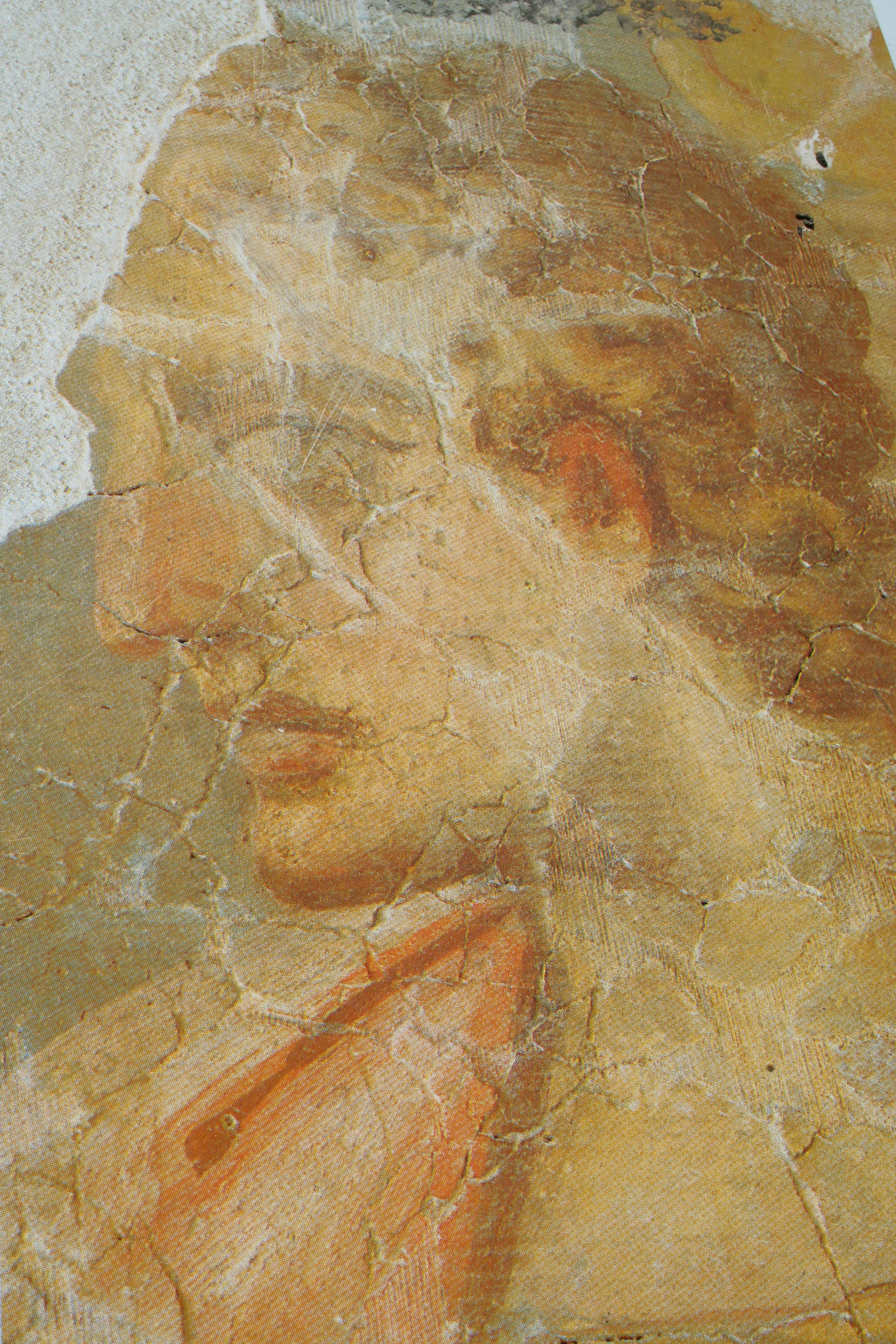 Portrait peint à fresque trouvé dans le complexe gallo-romain de l'hopital de Lisieux